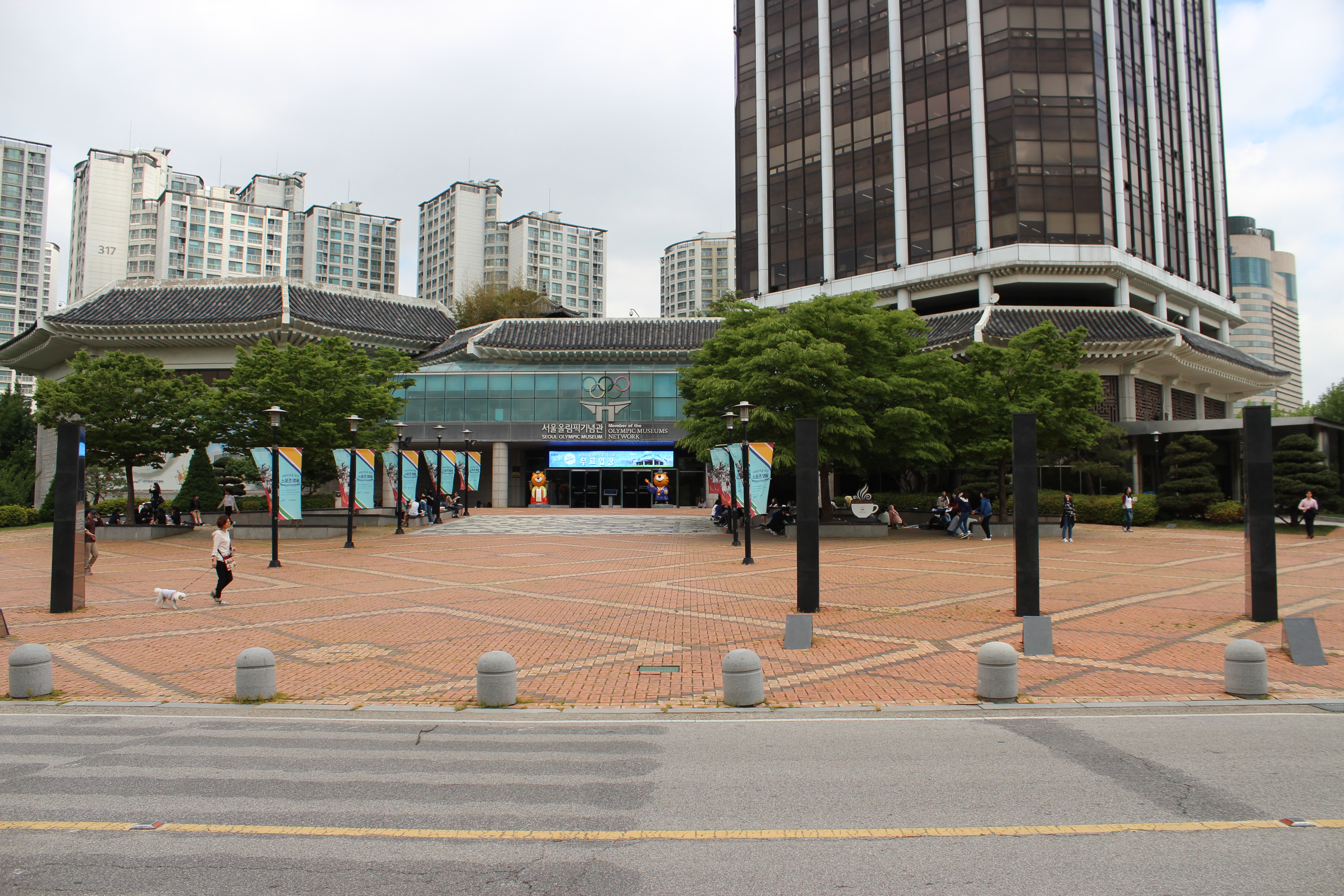 1988년 서울 올림픽 기념관